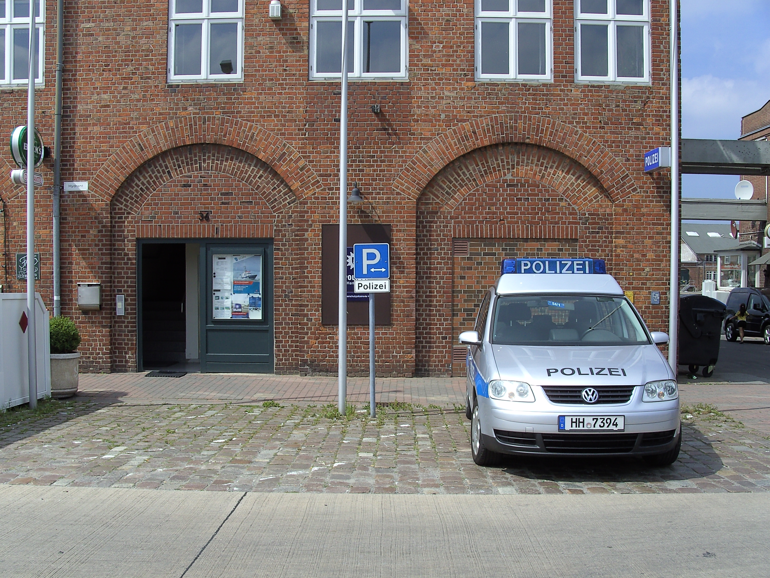 4. Wasserschutzpolizeirevier der Wasserschutzpolizei Hamburg in Cuxhaven, Präsident-Herwig-Straße 36